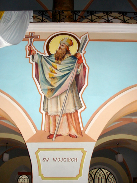 Kamienna Góra, kościół pw. śś Piotra i Pawła - św. Wojciech- fresk autorstwa Jana Molgi